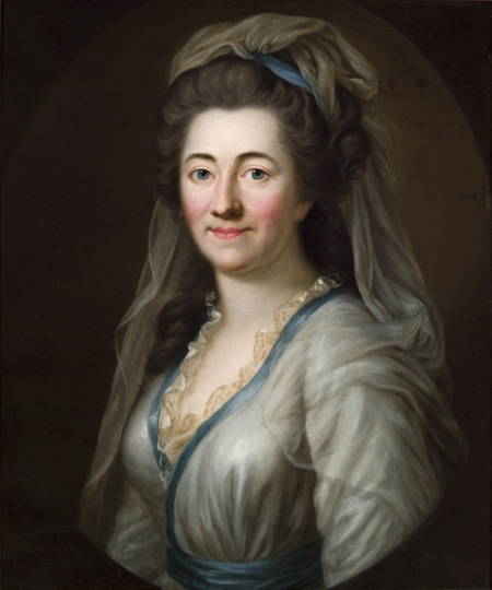 Elisabeth Charlotte Konstatia von der Recke, Gräfin von Medem